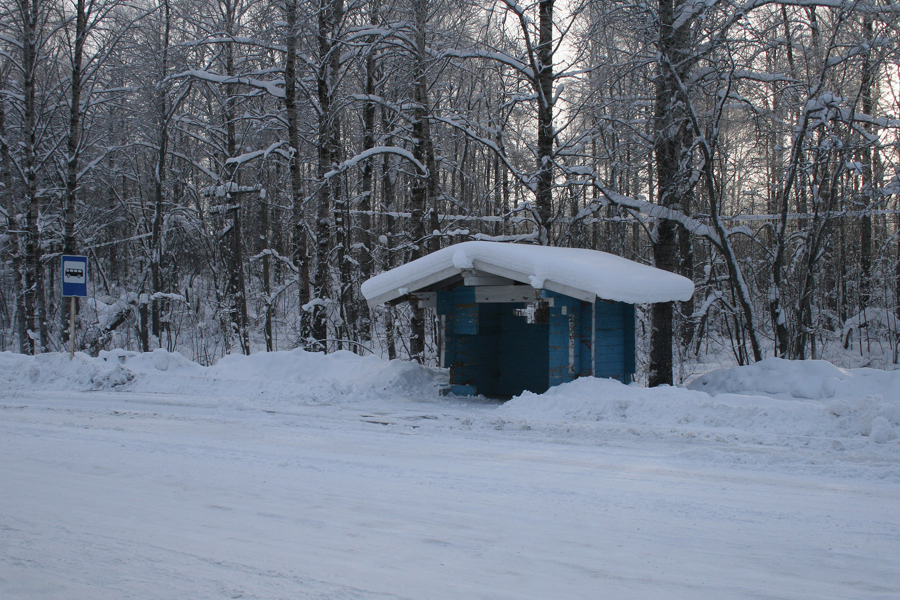 Автобусная остановка «Утуки». Петровское сельское поселение Кондопожского района Республики Карелия.